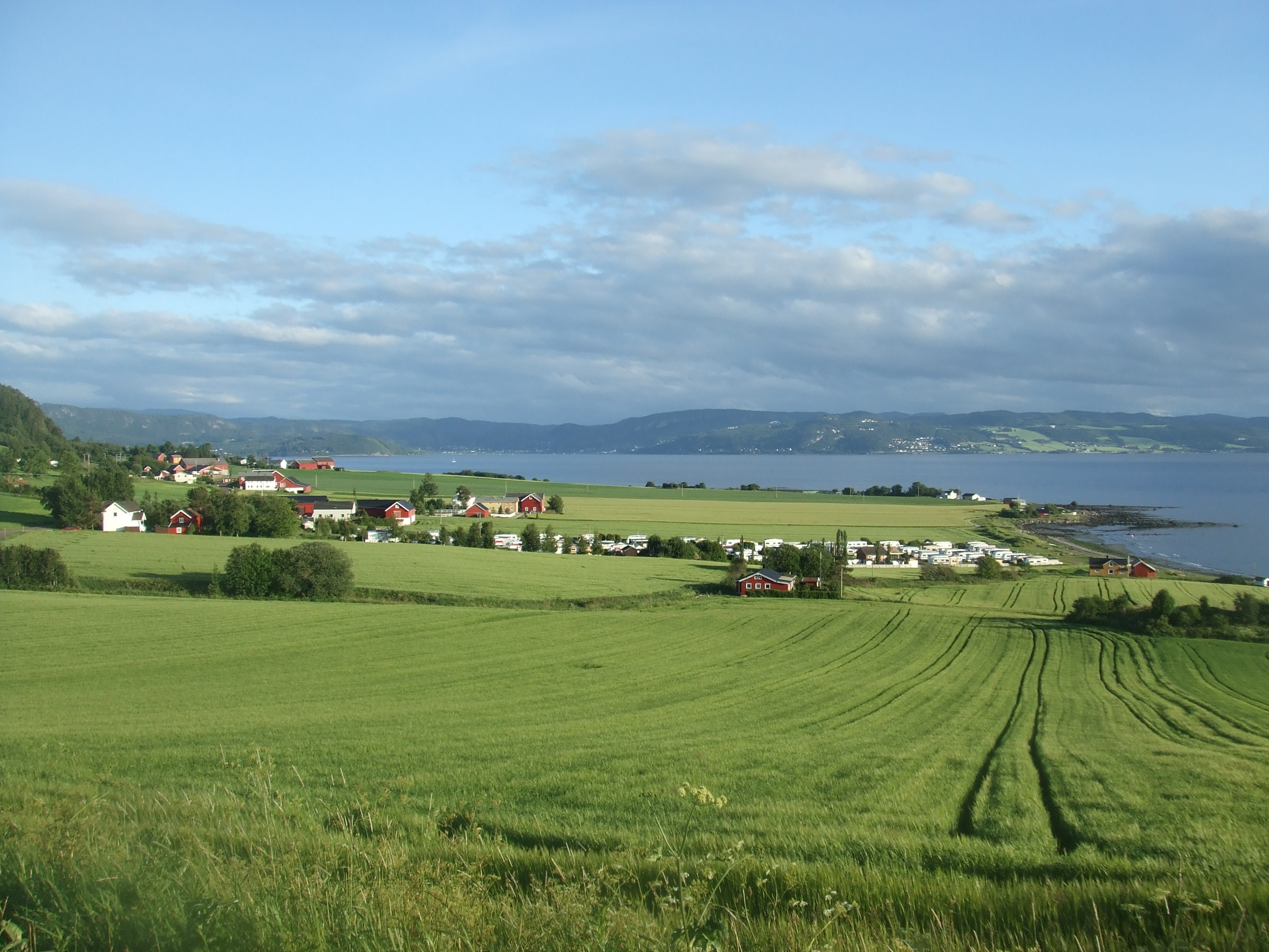 Vinge på Skatval i Stjørdal kommune.